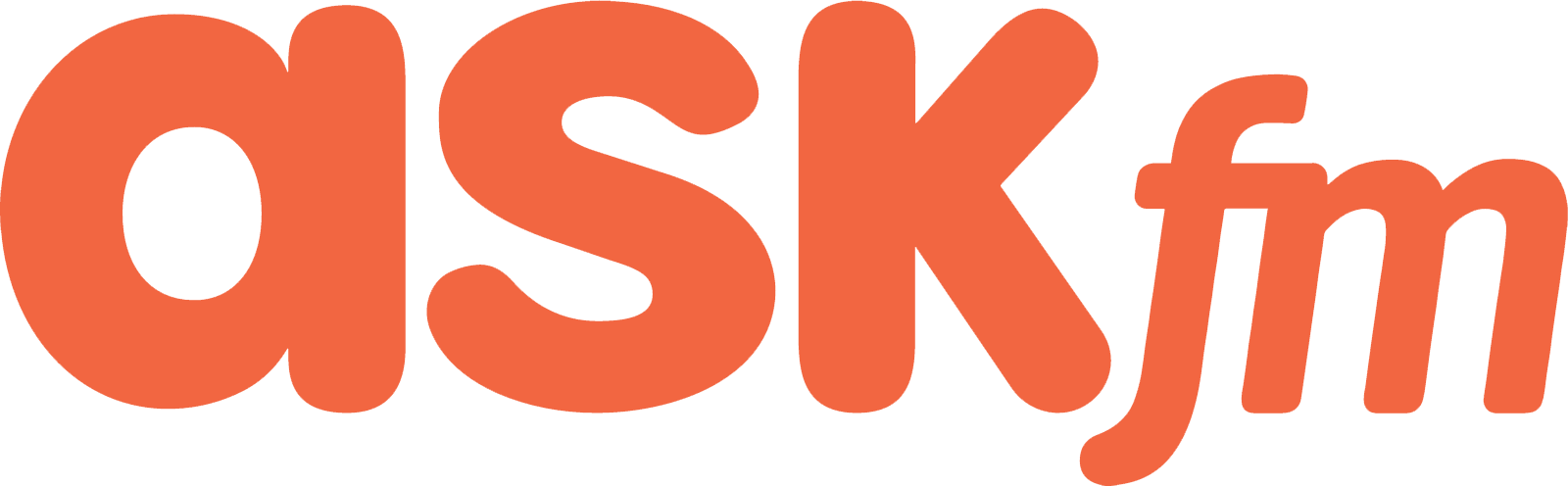 Logotype de ask.fm